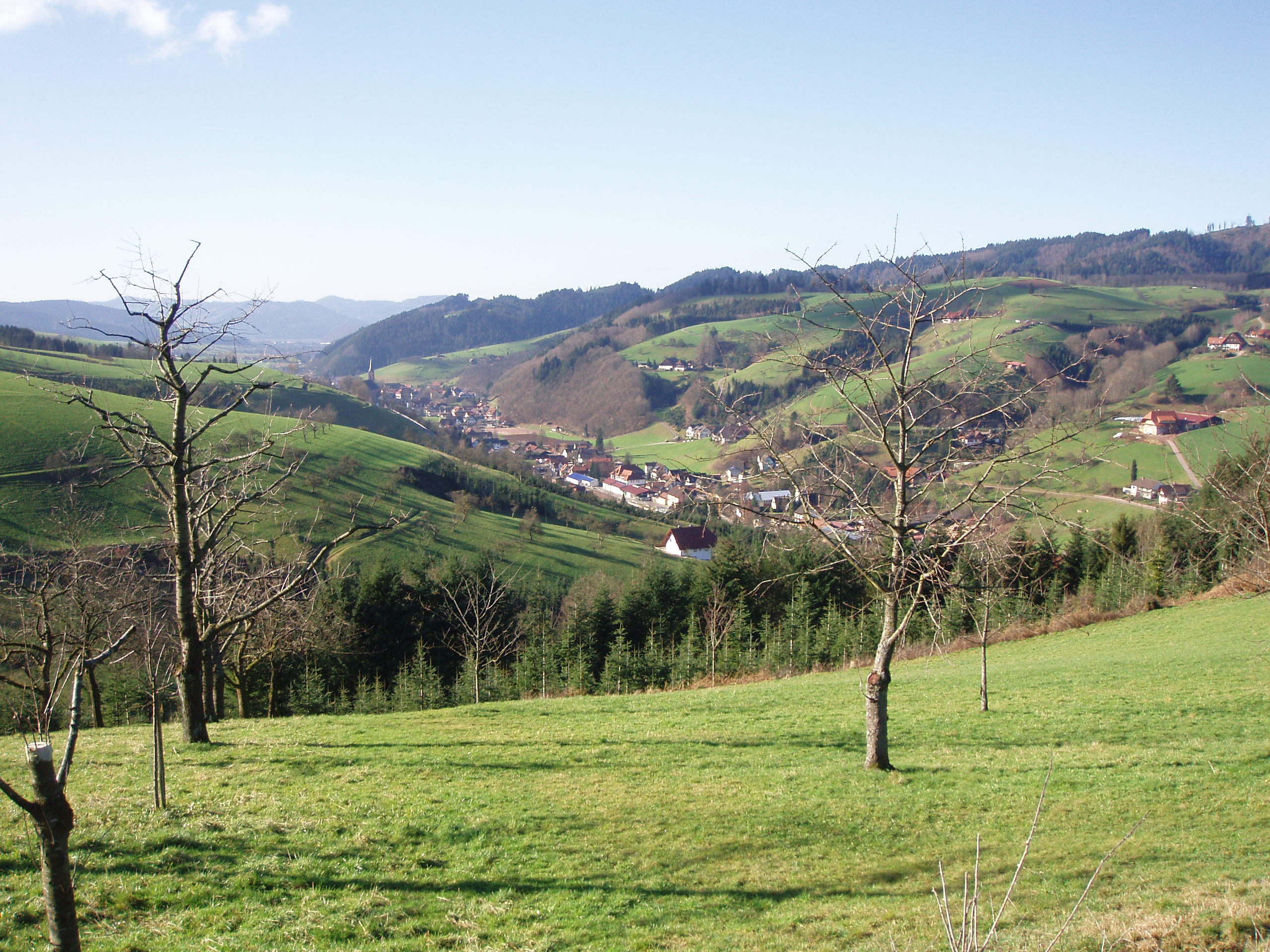 Oberharmersbach, von Osten aus fotografiert am Sonntag, 4. Januar 2007. Autor: Philipp Voßler